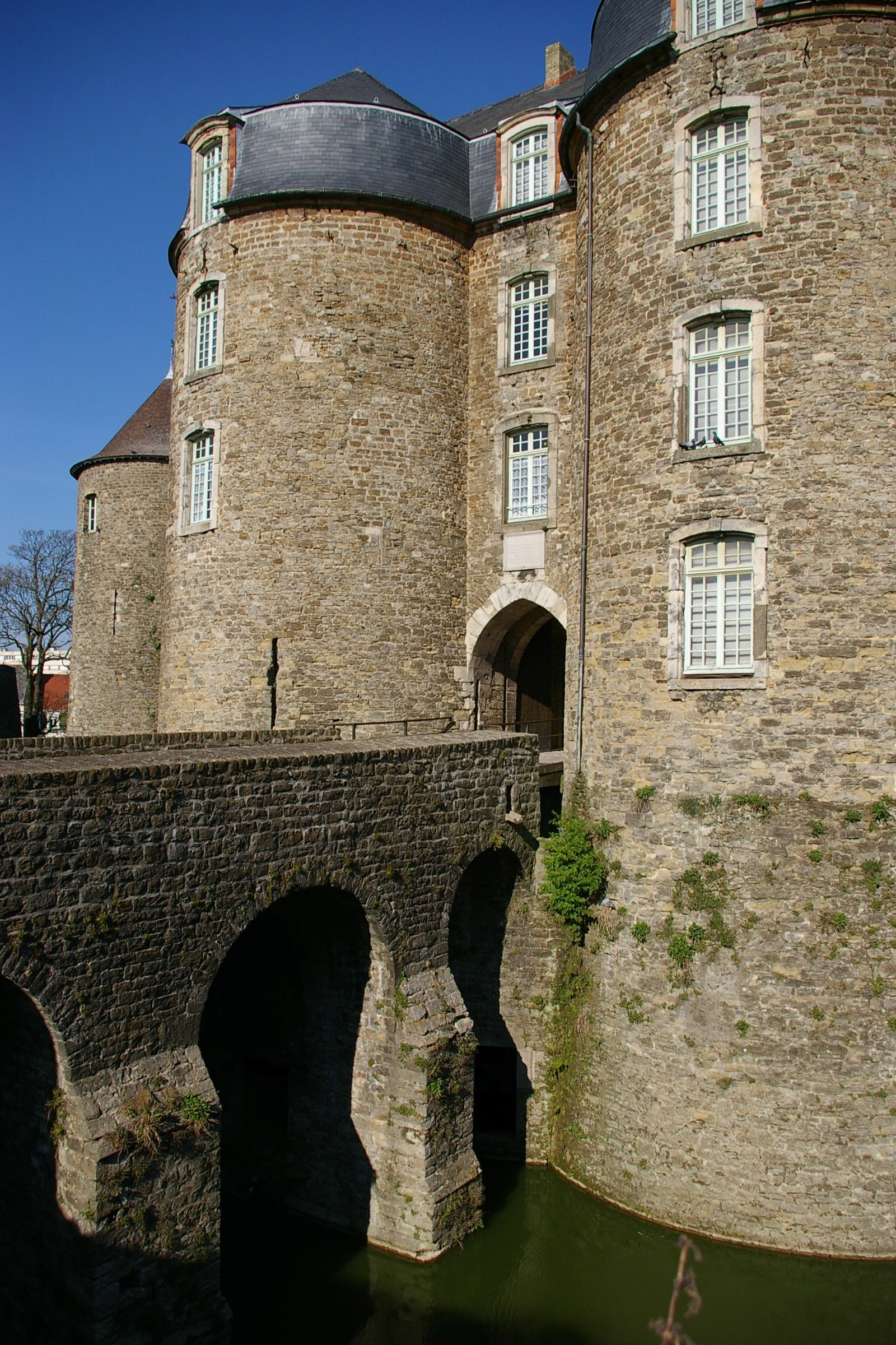 Boulogne castle entrance